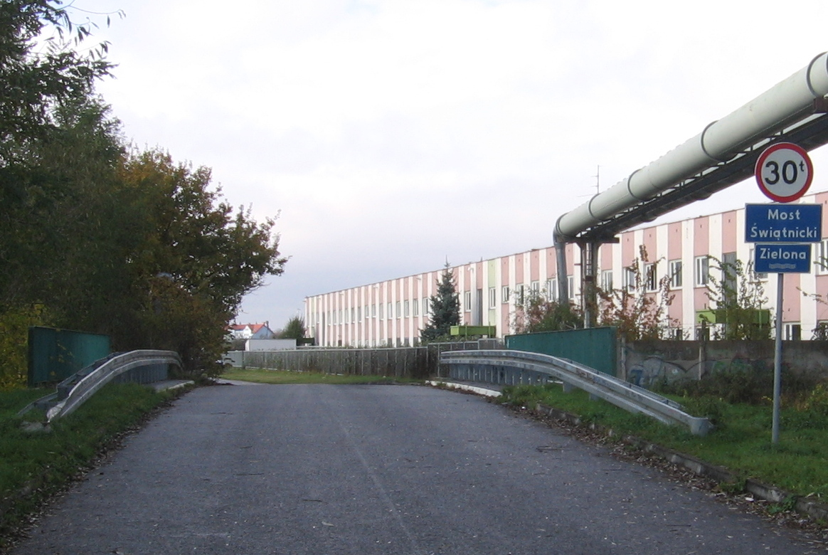 Most Świątnicki we Wrocławiu